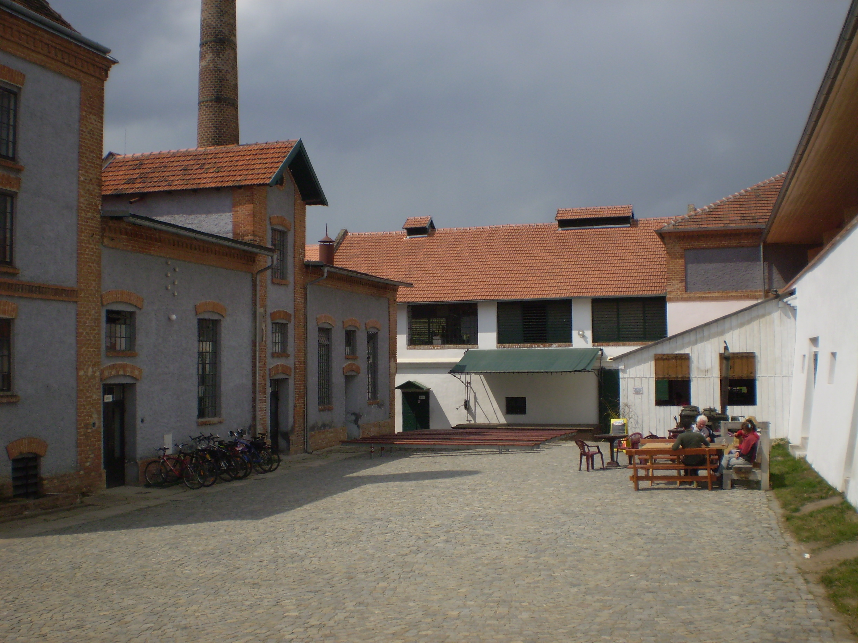 Pivovar Dalešice na Třebíčsku - nádvoří.